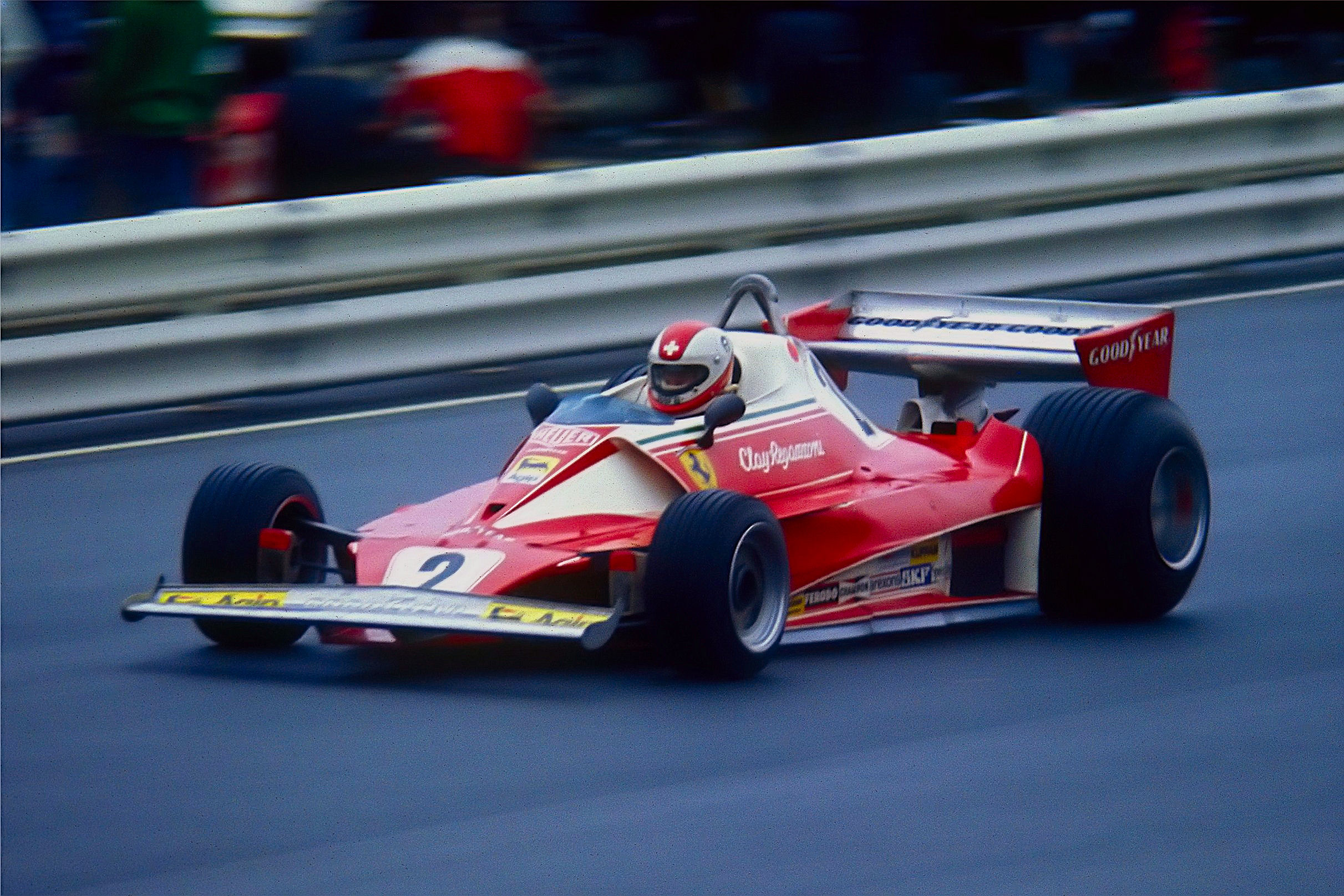 Clay Regazzoni im Ferrari 312T2 auf der Zielgeraden des Nürburgrings beim Training zum GP von Deutschland (Samstag, 31.07.1976)